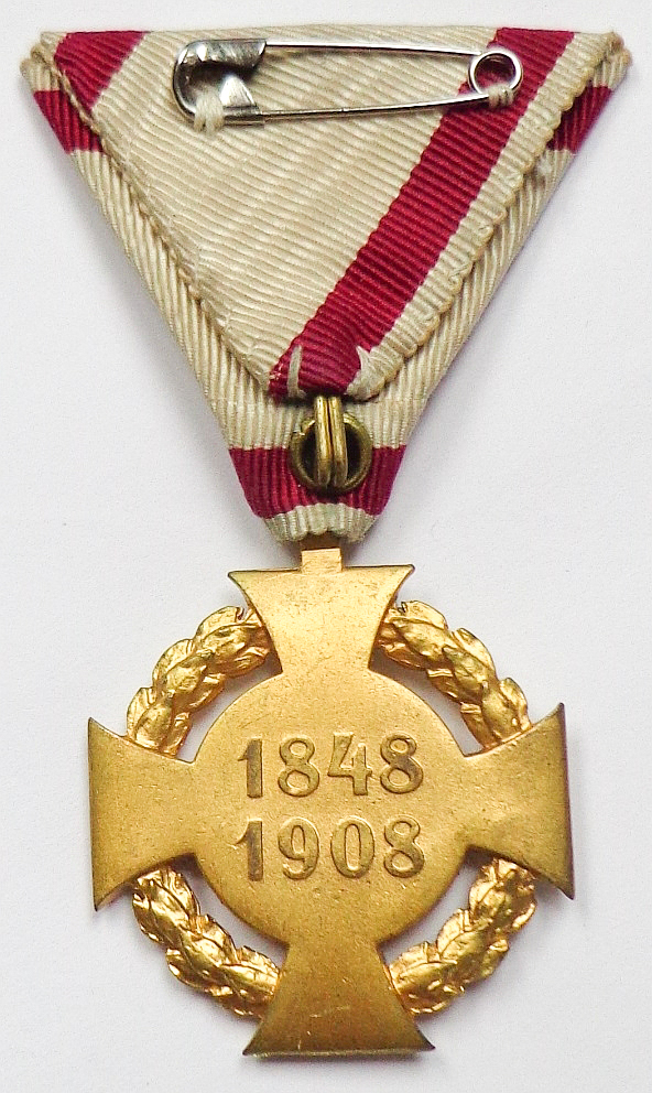 "Militär-Jubiläumskreuz", Revers, aus dem Besitz des Mathias Unterleitner (1890–1945)